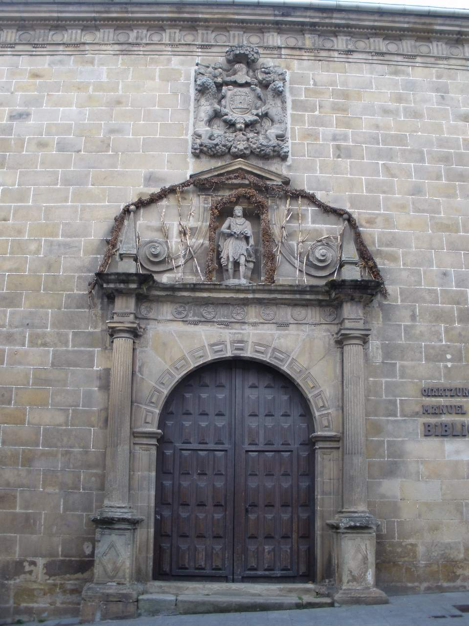 Basílica de San Juan Bautista (Oiartzun)